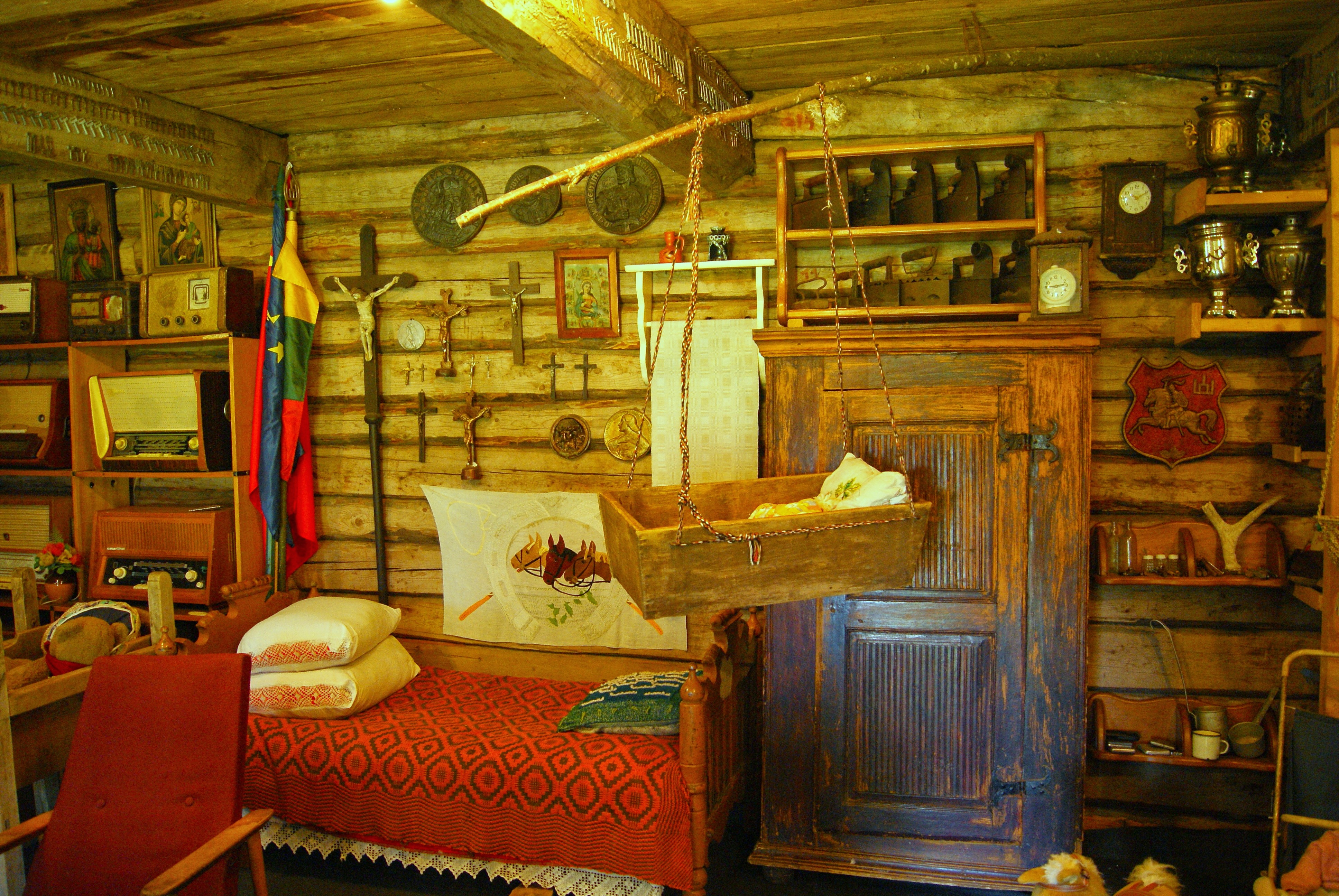 Tunaičiu sodyba- private ethnographic museum